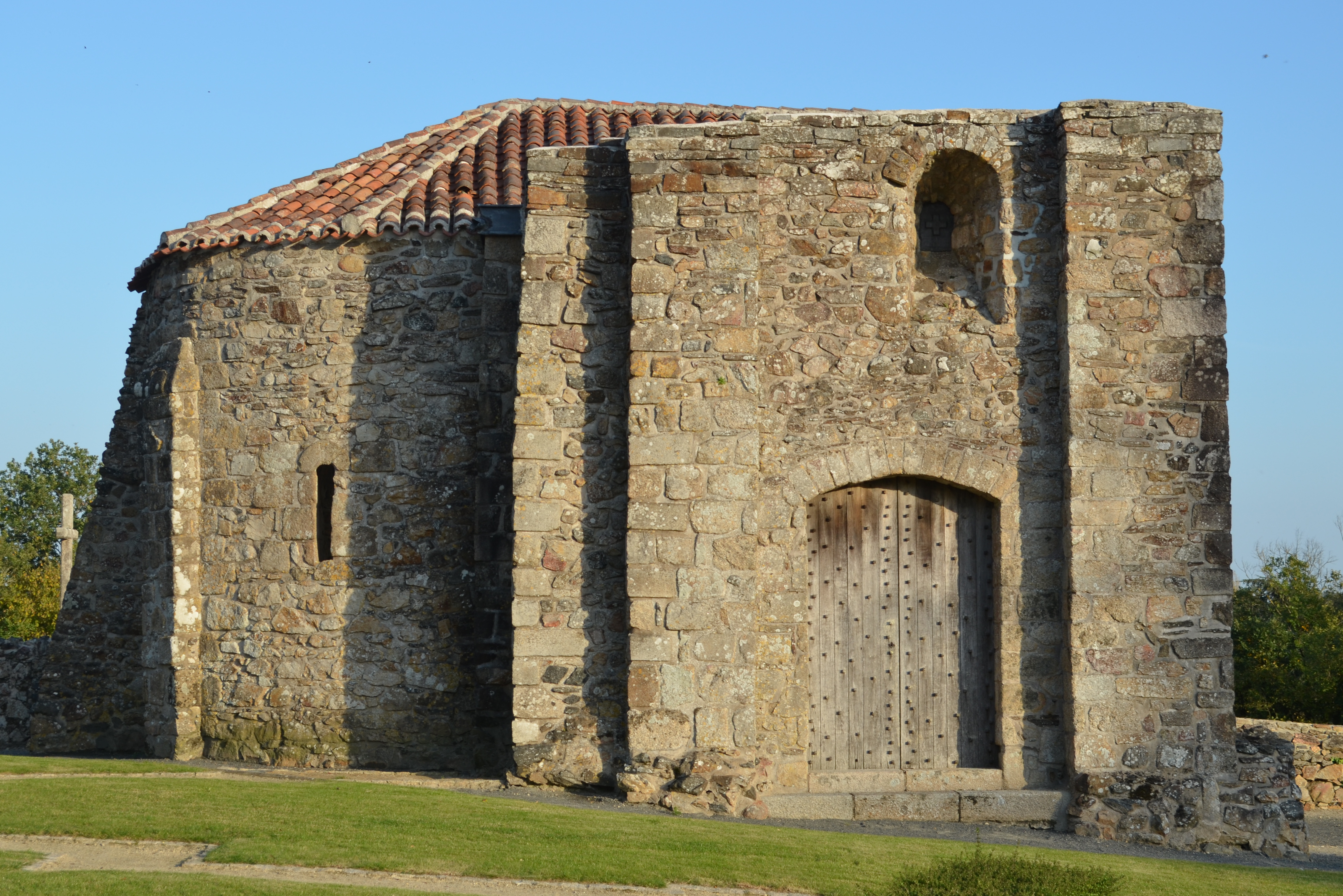 Chapelle Sainte-Anne - Le Pallet (Loire-Atlantique)